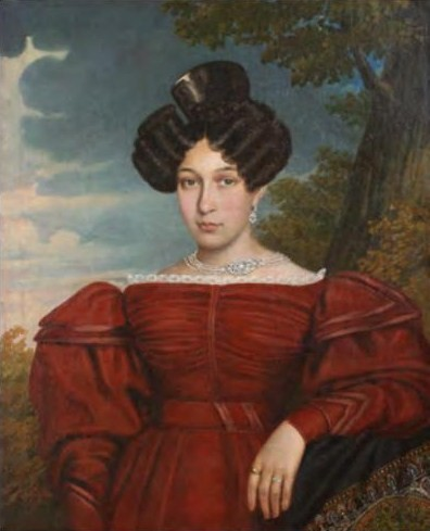 Аграфена (Агриппина) Фёдоровна Половцова, урожденная Татищева (1811–1877), супруга Александра Андреевича Половцова (с 1831), мать Александра Александровича Половцова.